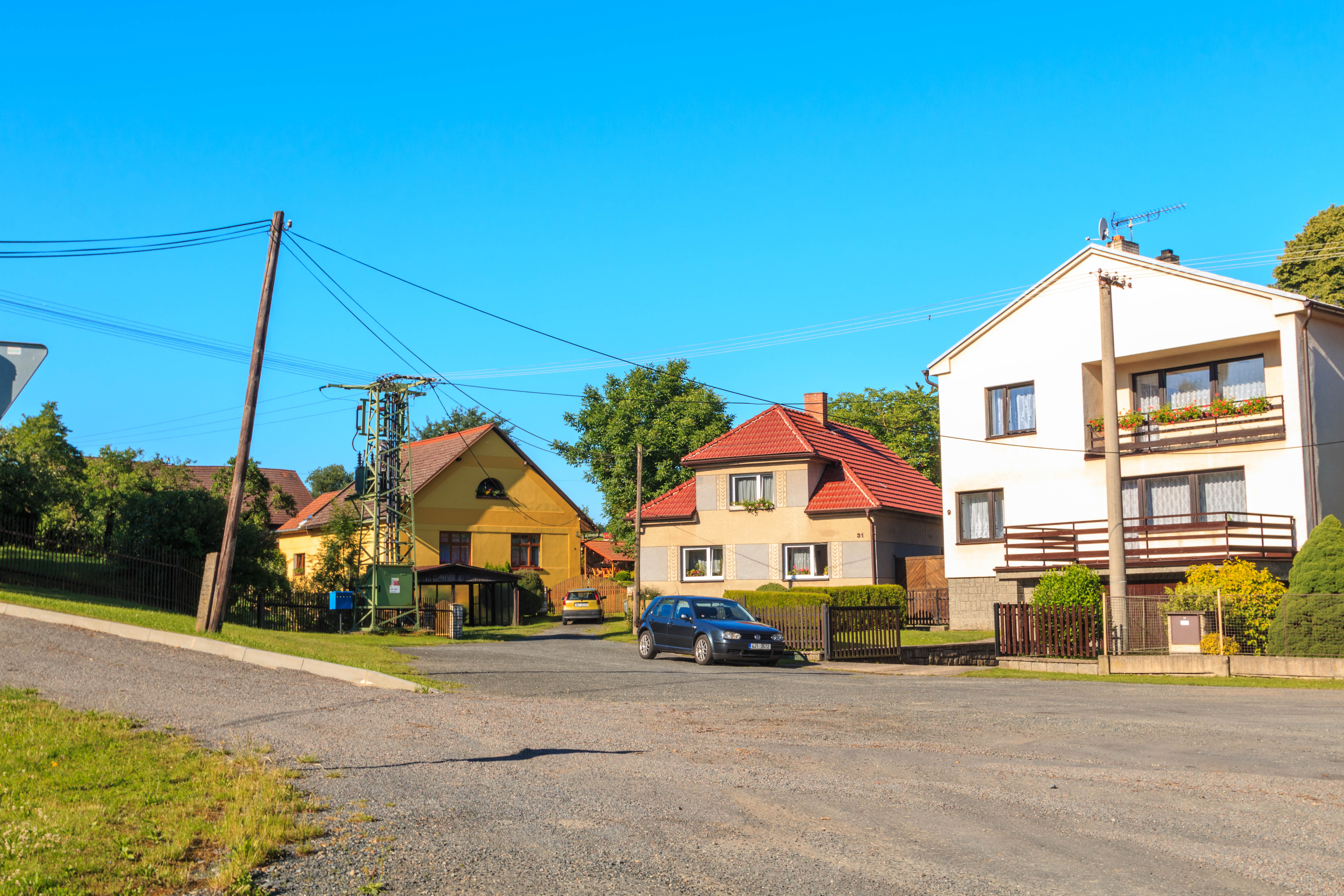 Nasavrky čp. 31